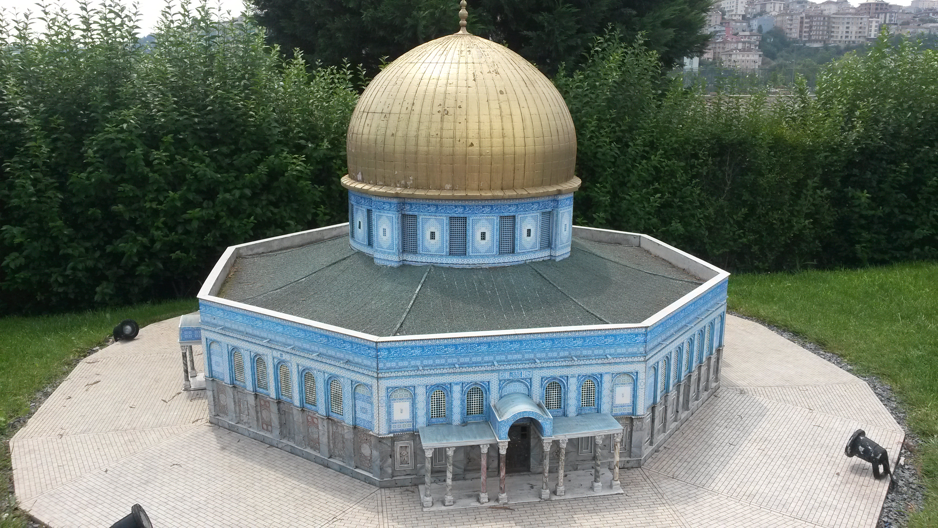 Bu dosyada islam dinine ait mescid-i aksayı anlatan bir fotoğraftır.